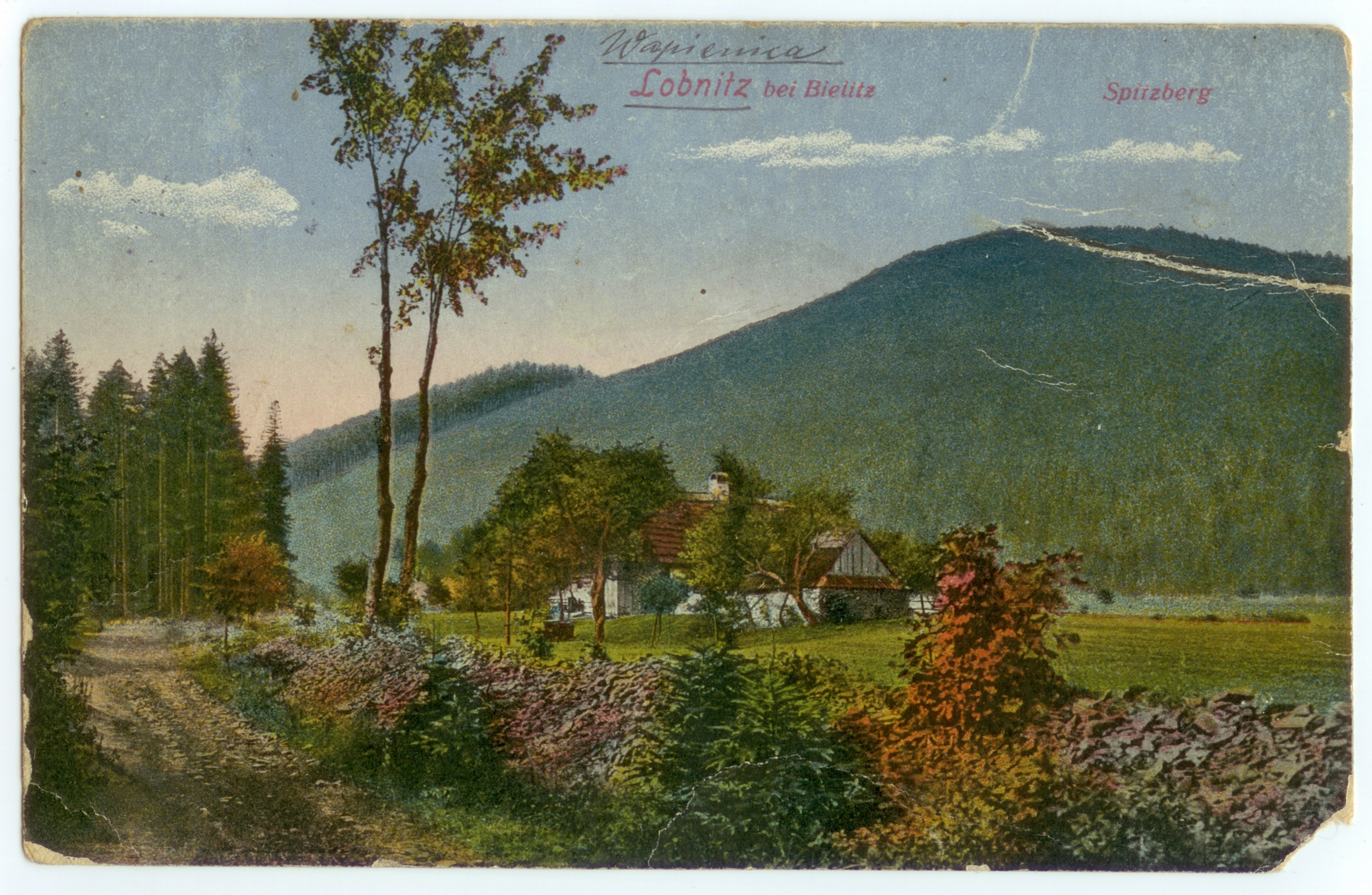 Palenica, Spitzberg (Beskid Śląski), Wapienica, Lobnitz